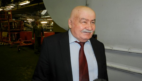 Ведущий конструктор проекта автомобиля "Нива" Пётр Прусов